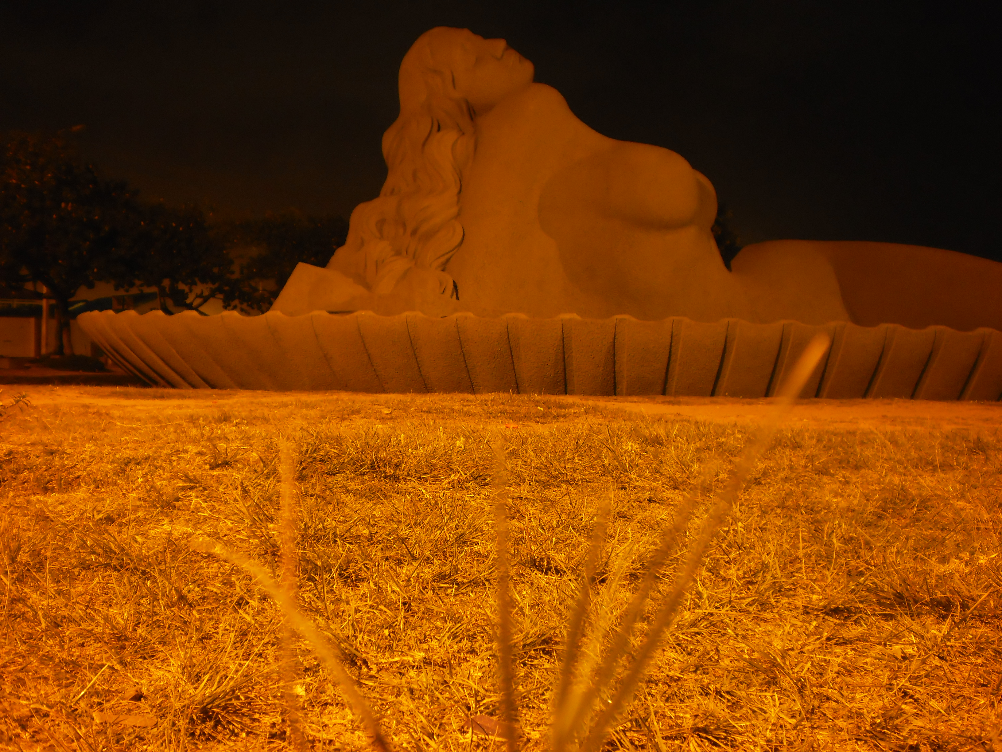 ശംഖുമുഖം കടല്‍ത്തീരത്തെ സാഗരകന്യക എന്ന ശില്പം. ഒരു രാത്രികാഴ്ച.